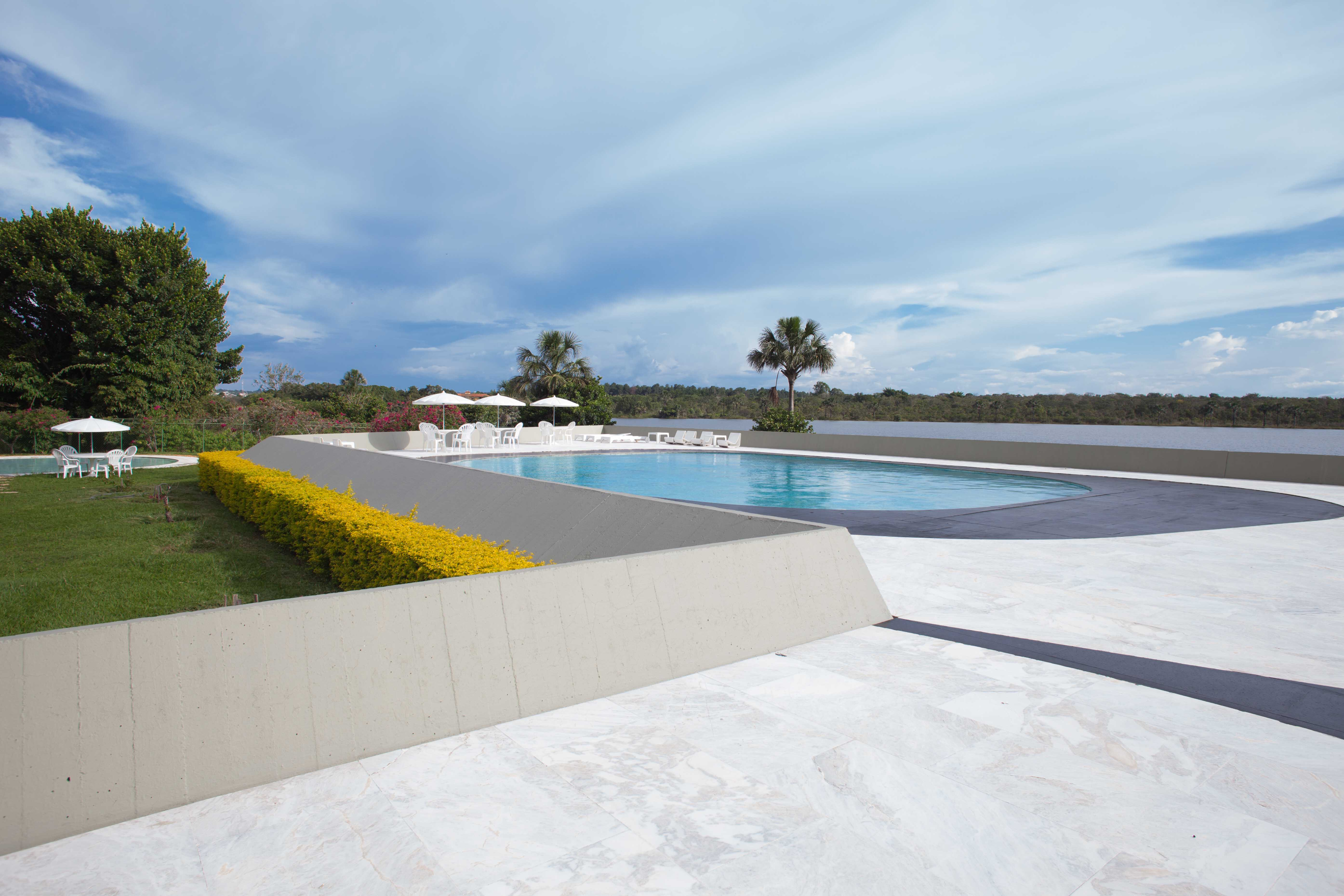 Palácio do Jaburu - Pátio externo e piscina Foto: Julia Maass